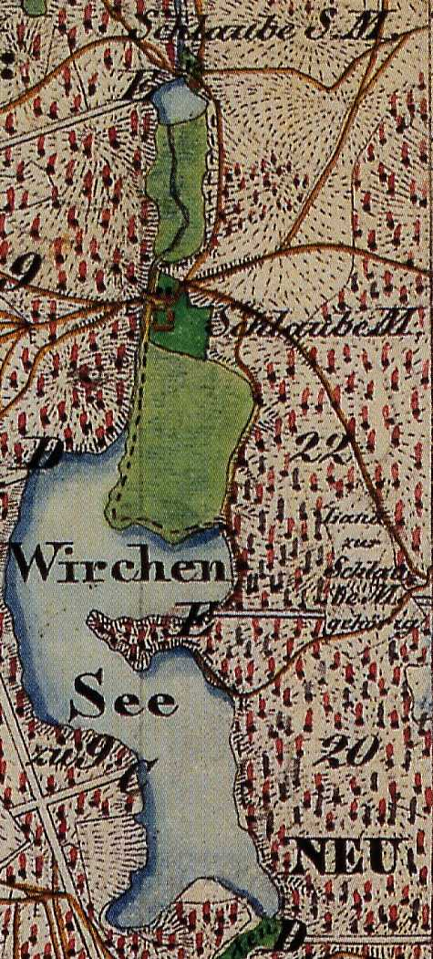 Treppeln, Ortsteil der Gemeinde Neuzelle, Lkr. Oder-Spree, Brandenburg, Deutschland. Die Schlaubemühle auf einem Ausschnitt des Urmesstischblattes 3953 Groß Muckrow von 1844